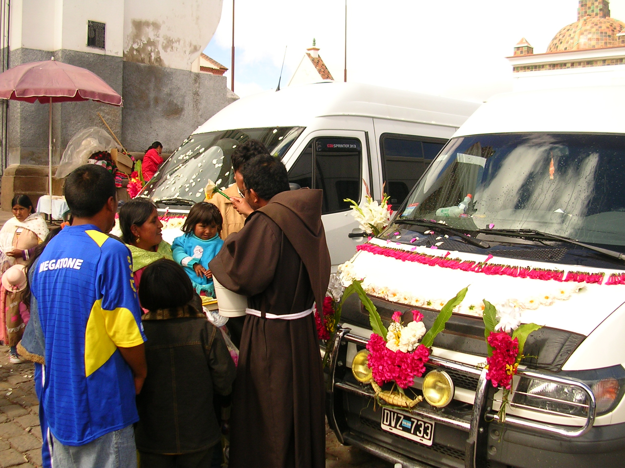 Bautismo de autos frenta a la entrada de la Basílica de nuestra señora de Copacabana (Bolivia)